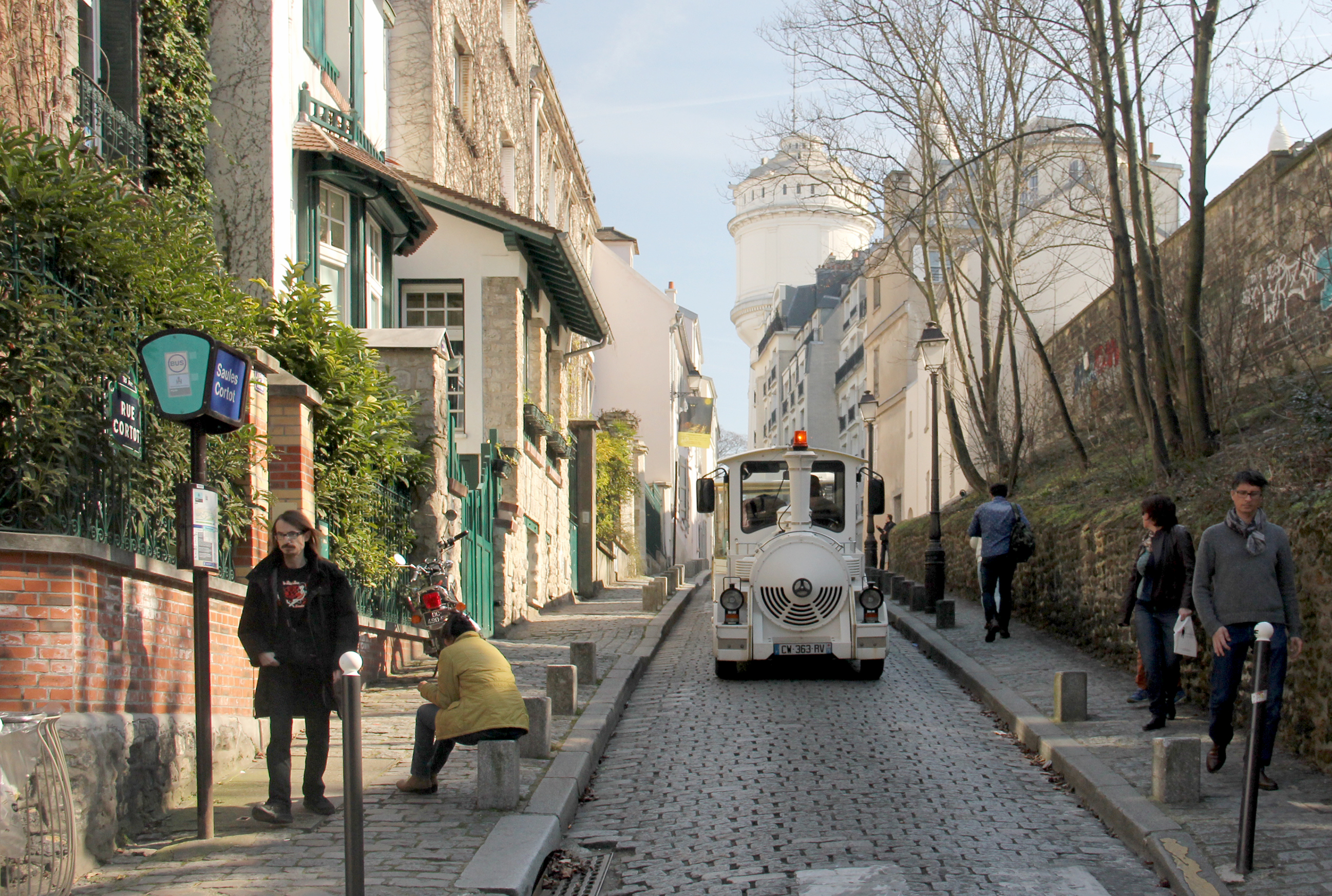 Rue Cortot, Paris.